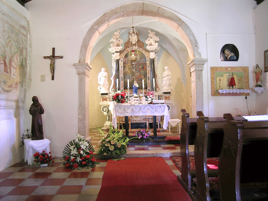 Lipa, općina Matulji, Primorsko-goranska županija. Kapela sv. Jelene križarice, oltar.